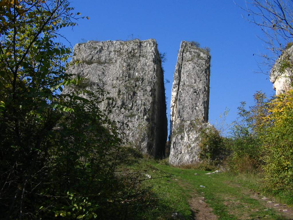 Горталово - Разцепеният камък